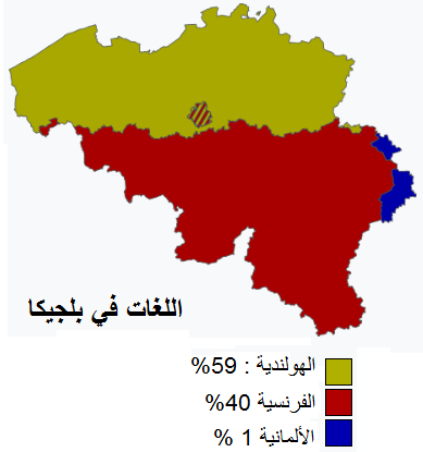 خريطة تبين التوزيع اللغاوي في مملكة بلجيكا